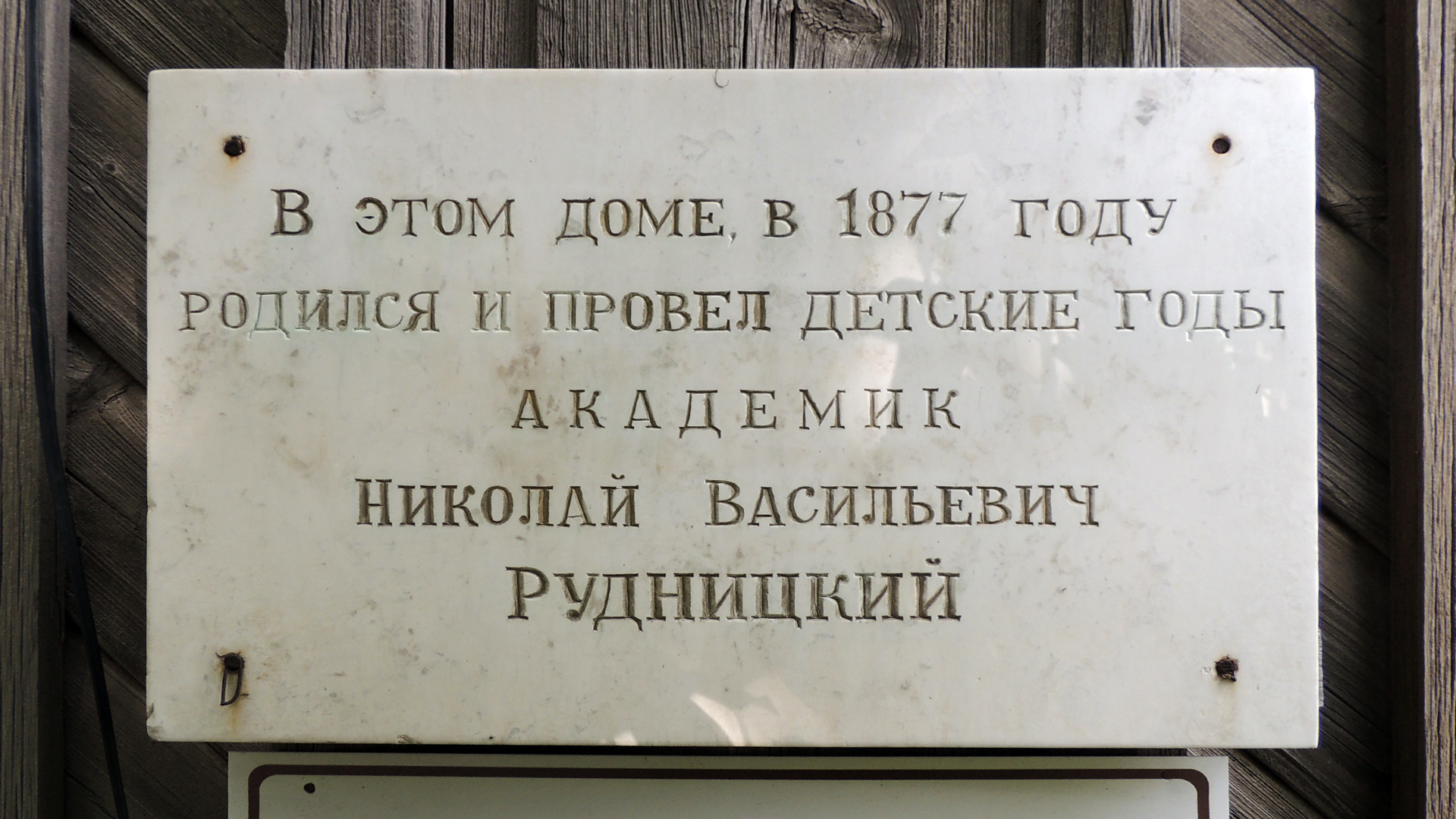 Дом, в котором родился и жил академик-селекционер Н. В. Рудницкий: улица Гоголя, 19, Яранск, Яранский район, Кировская область